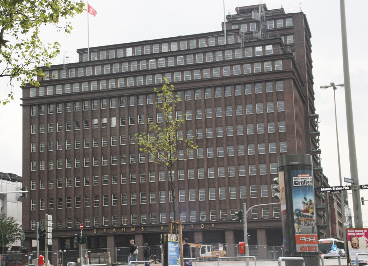 Brahms Kontor Hamburg This is a photograph of an architectural monument.